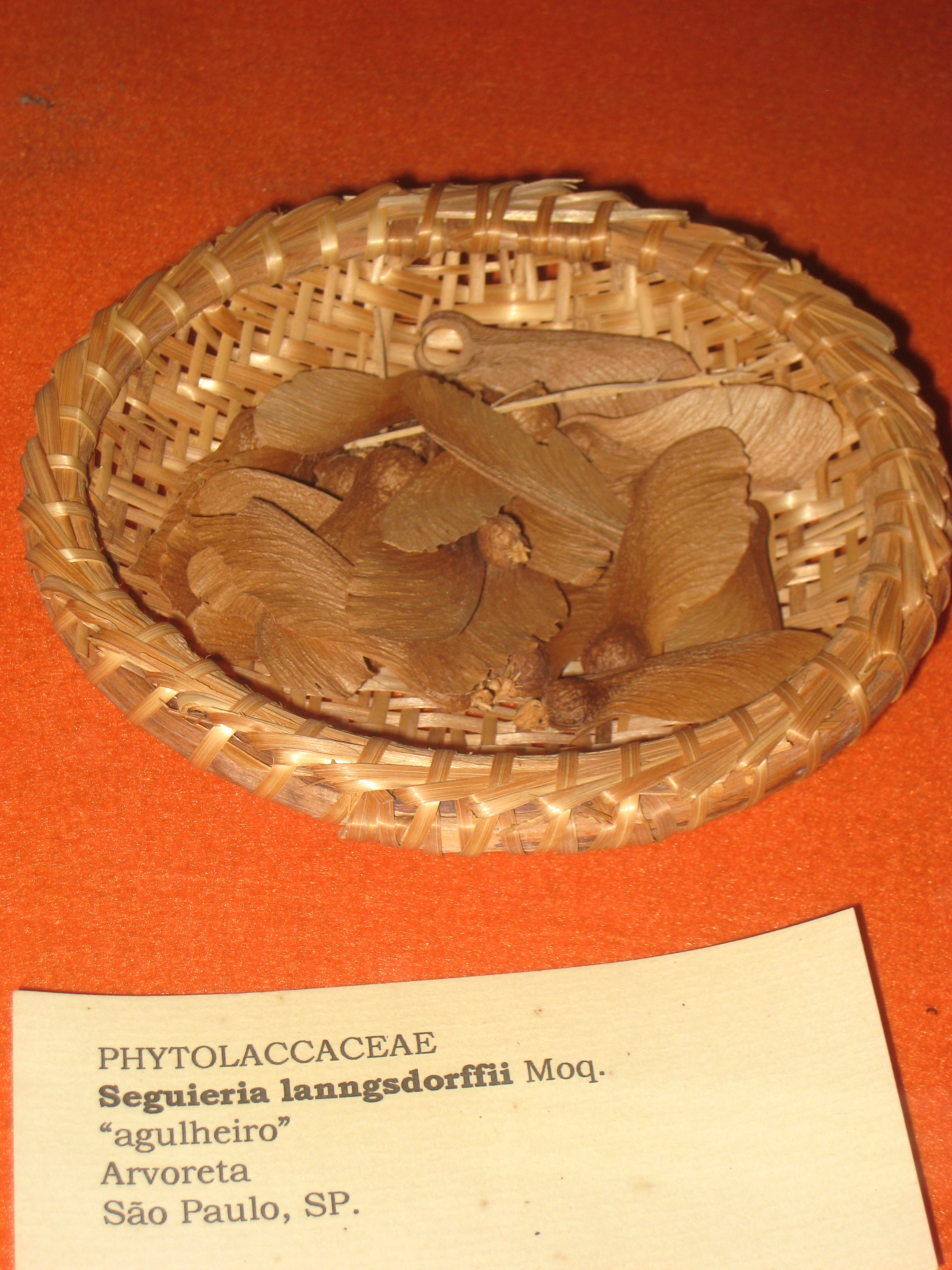 Seguieria langsdorffii specimen in the Museu Botânico Dr. João Barbosa Rodrigues, Jardim Botânico de São Paulo, São Paulo City, SP, Brazil.